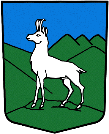 Wappen von Trient Kanton Wallis Schweiz